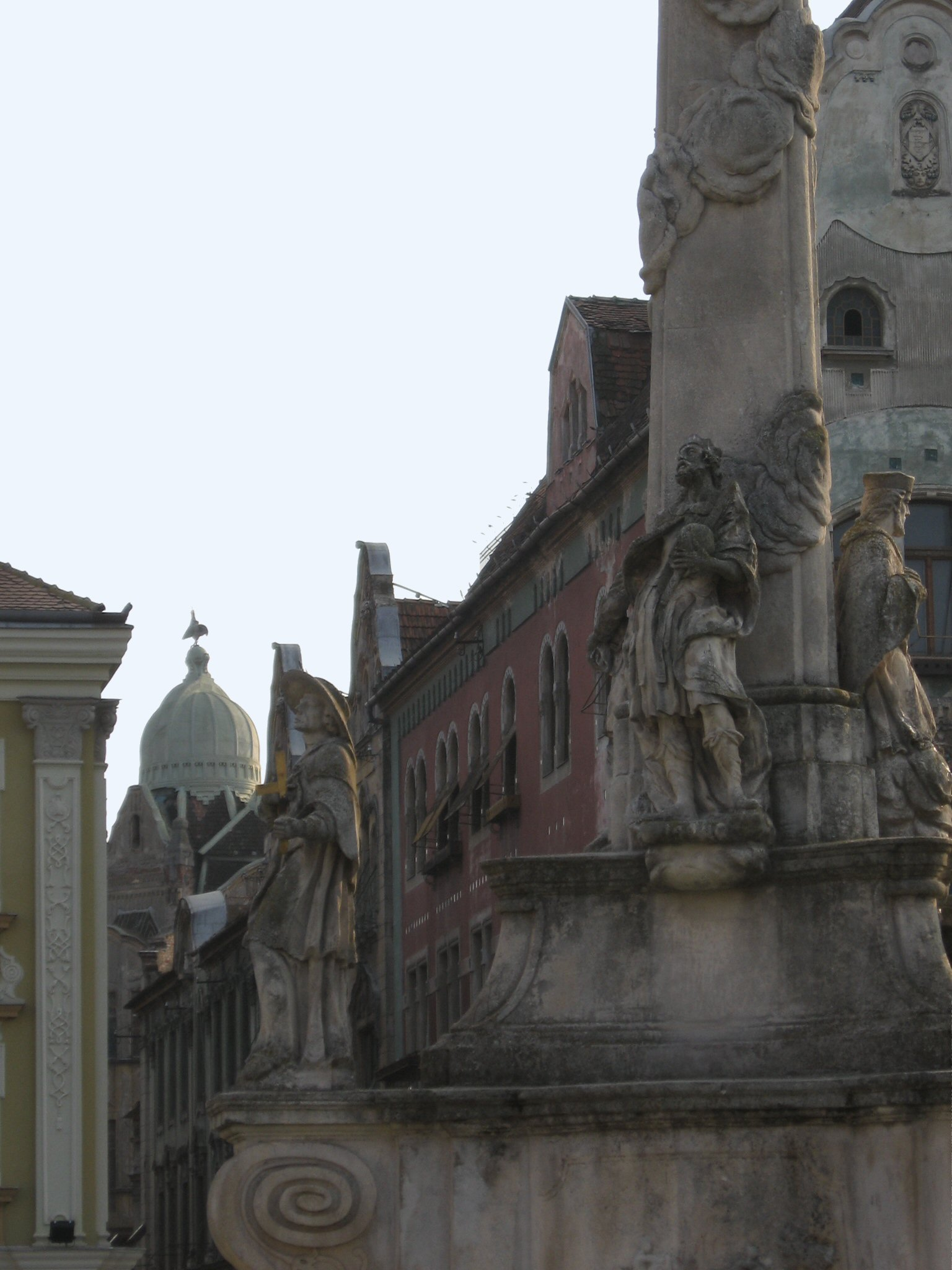 A temesvári Szentháromság-szobor részlete